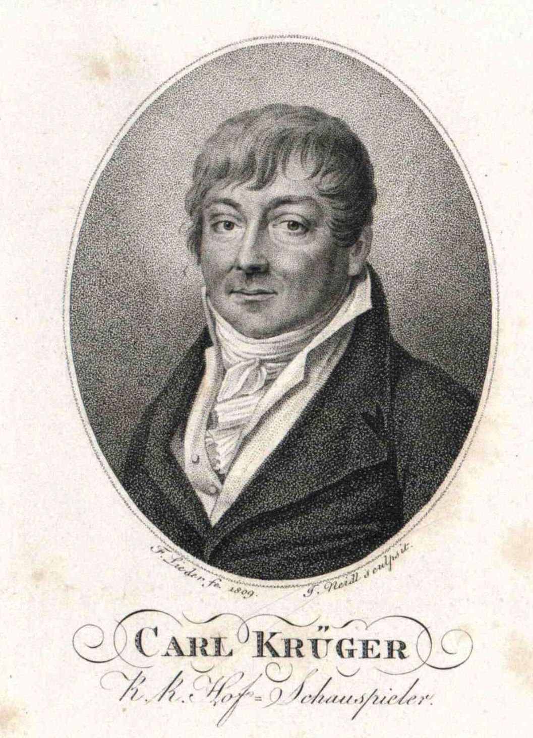 Karl Friedrich Krüger Wien, Österreichische Nationalbibliothek, Bildarchiv und Grafiksammlung, Porträtsammlung, Inventar-Nr. PORT_00147262_01